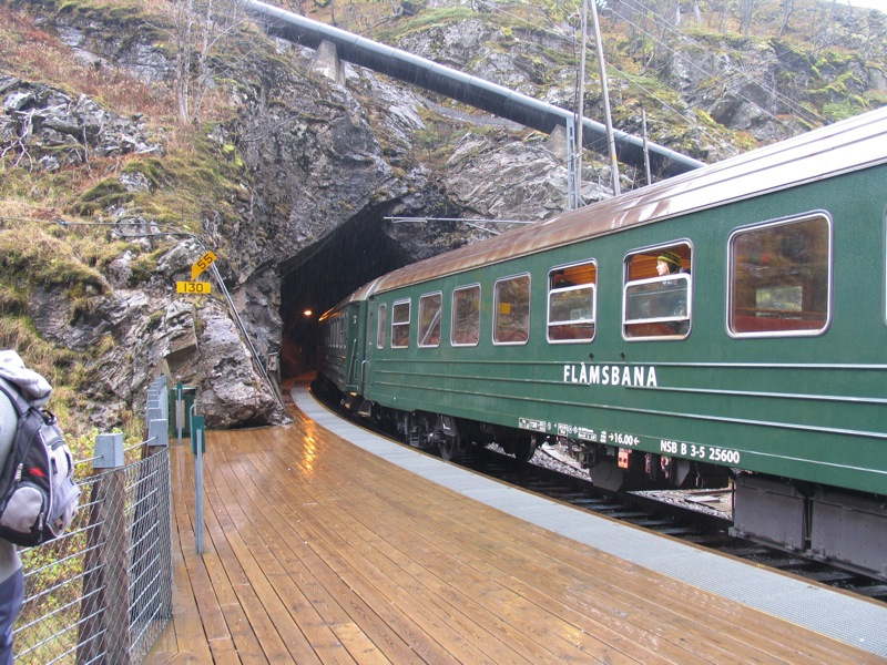 Kjosfossen haldeplass